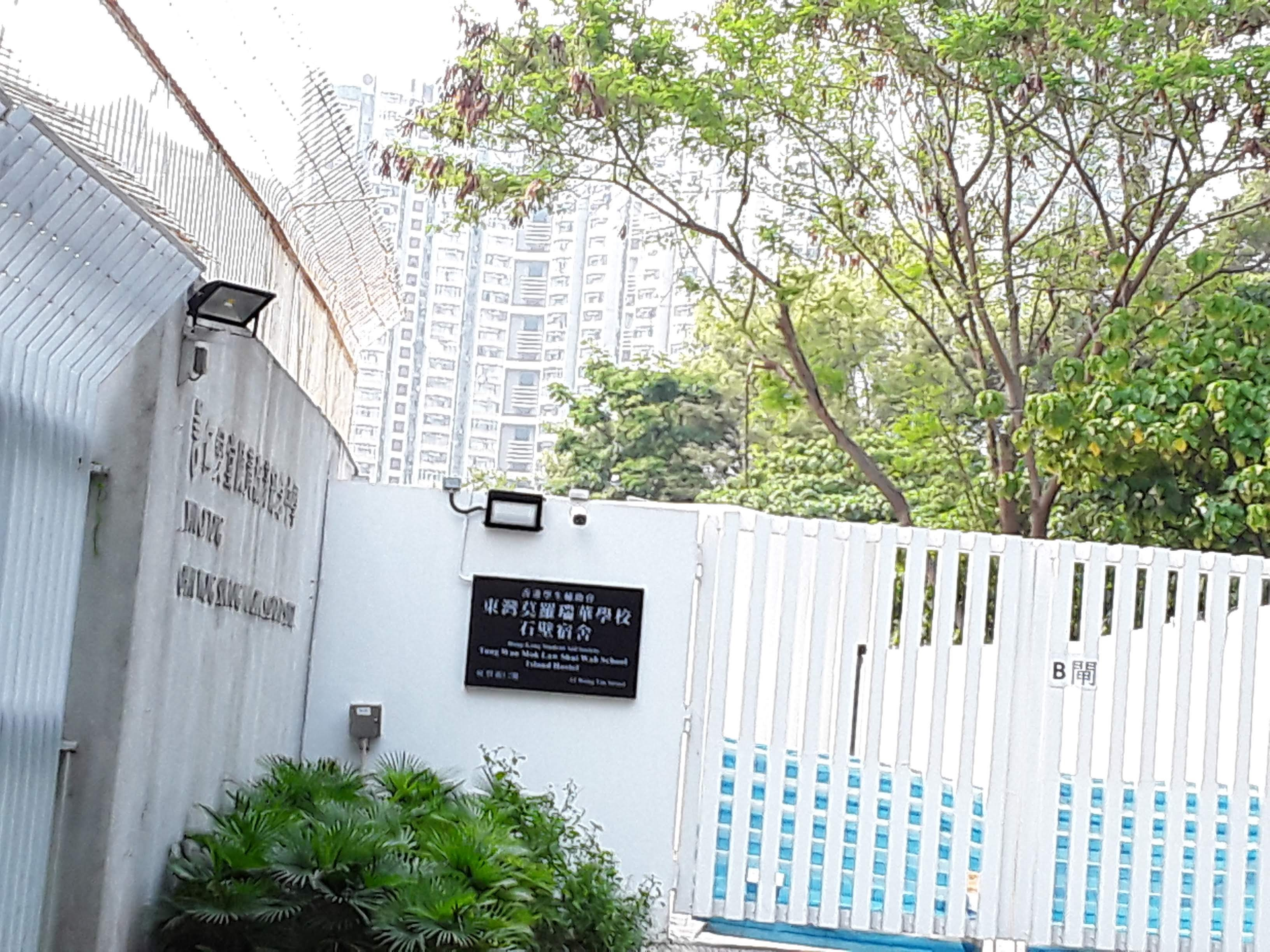 仁愛堂陳黃淑芳紀念中學正門大閘與東灣莫羅瑞華學校石壁宿舍B閘